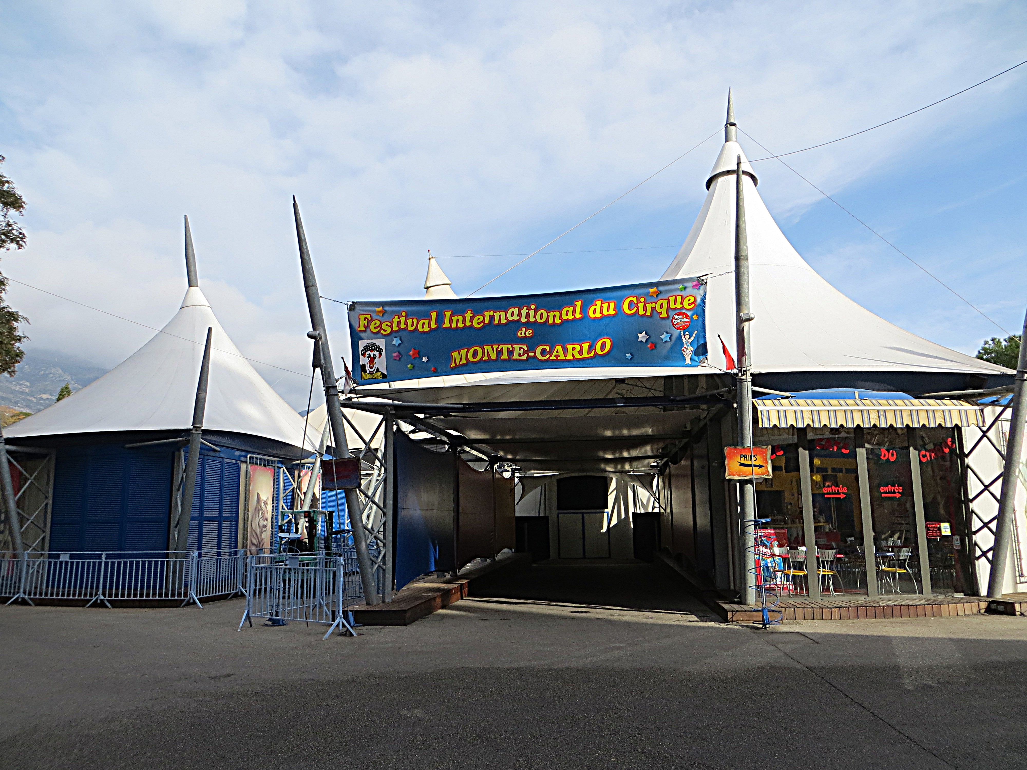 Festival International du Cirque de Monte-Carlo